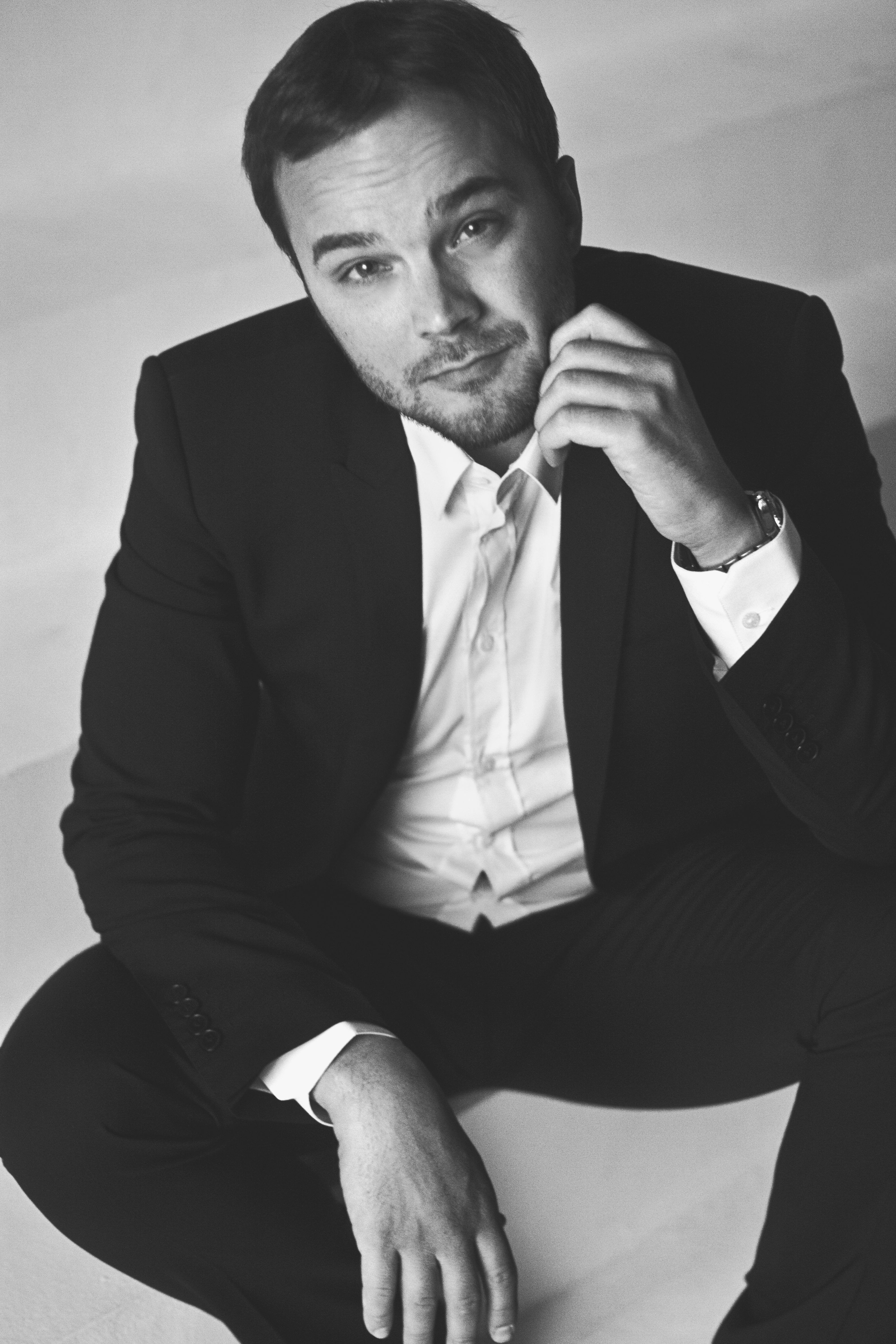 Андрей Чадов